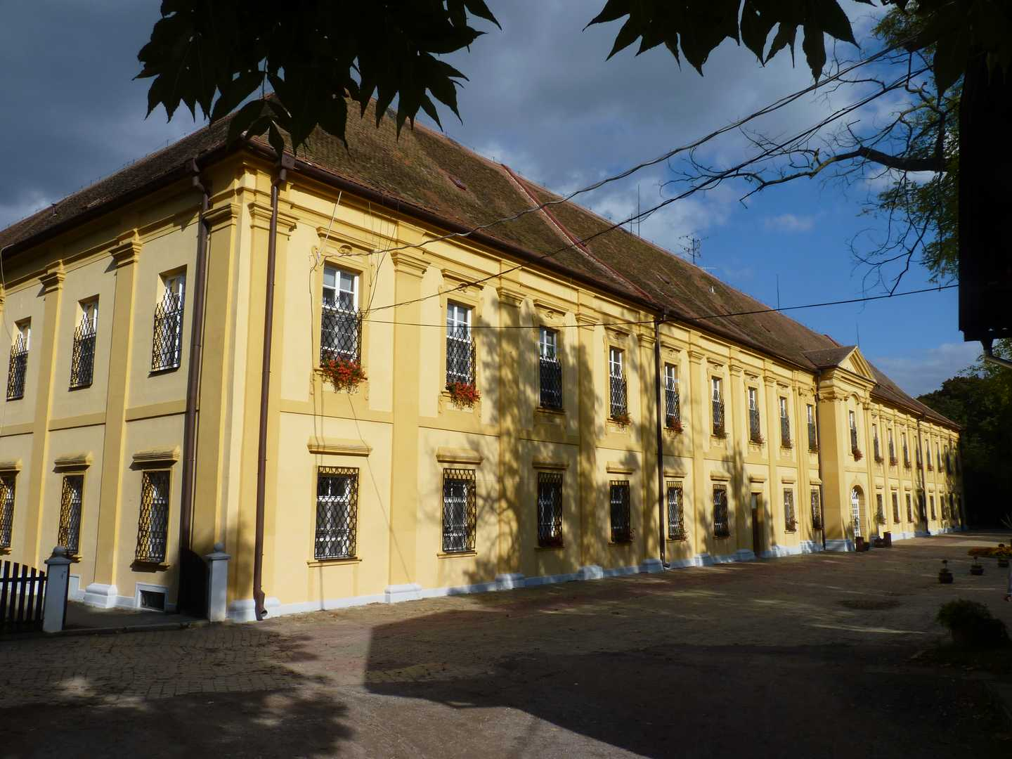 Zámek Břežany